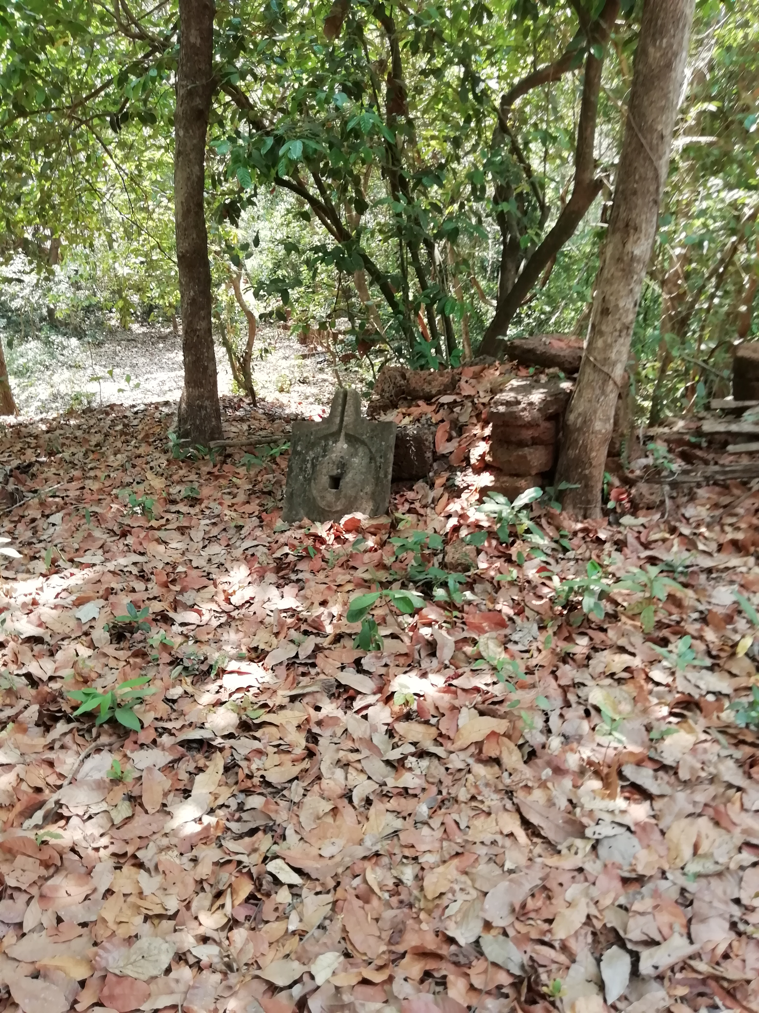 ಕನ್ನಡ: ನಿಡ್ಪಳ್ಳಿಯ ಪುರಾತನ-ಜೀರ್ಣ ಶಿವದೇವಸ್ಥಾನದ ಶಿವಲಿಂಗದ ಪೀಠ